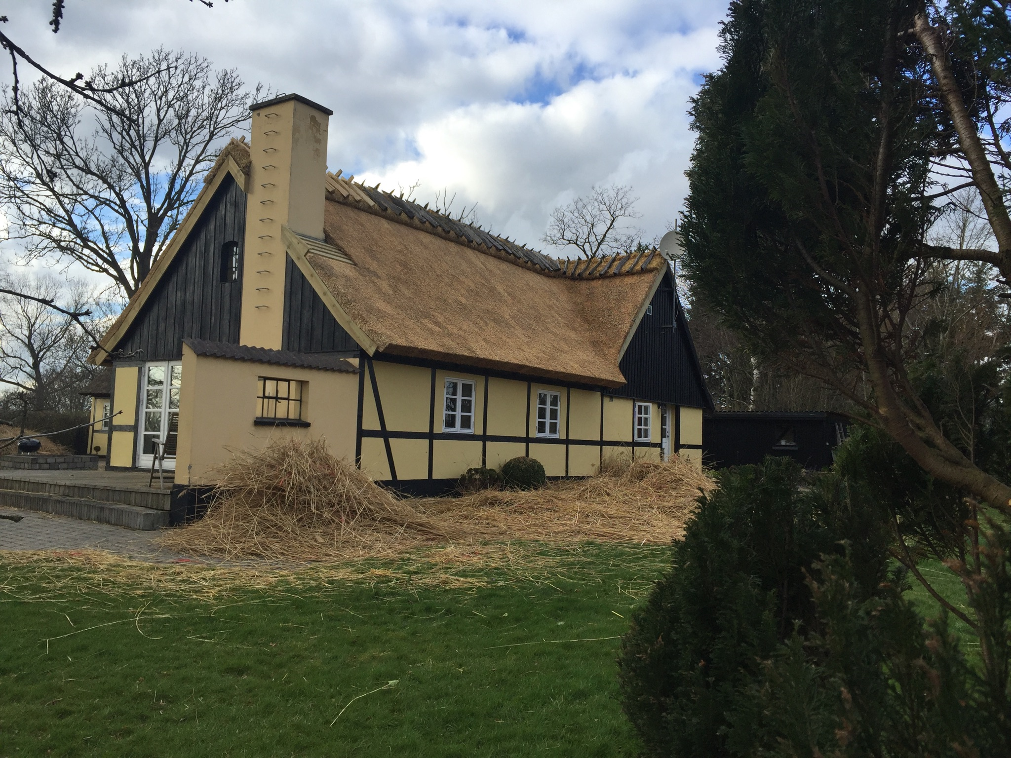 Den gamle smedje får nyt tag 2016